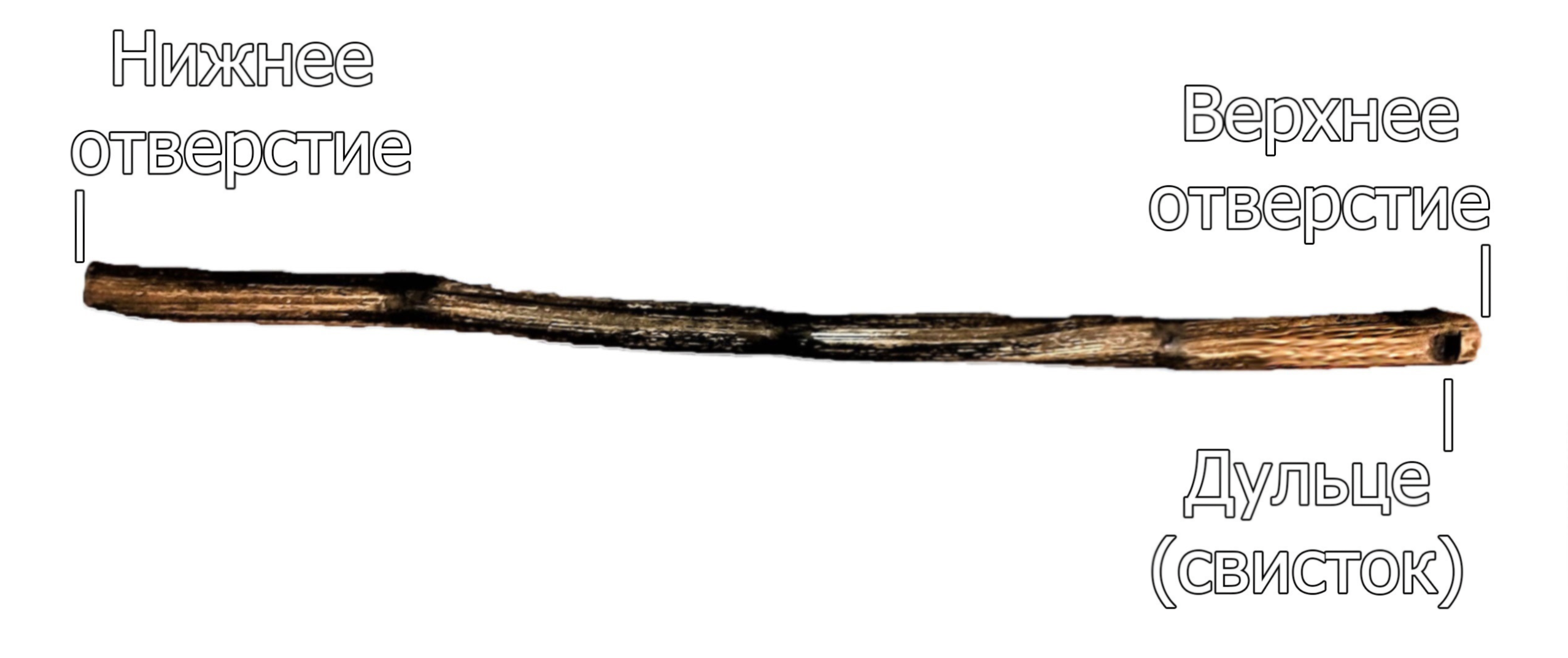 Описание составляющего калюки, сделанного из борщевика.